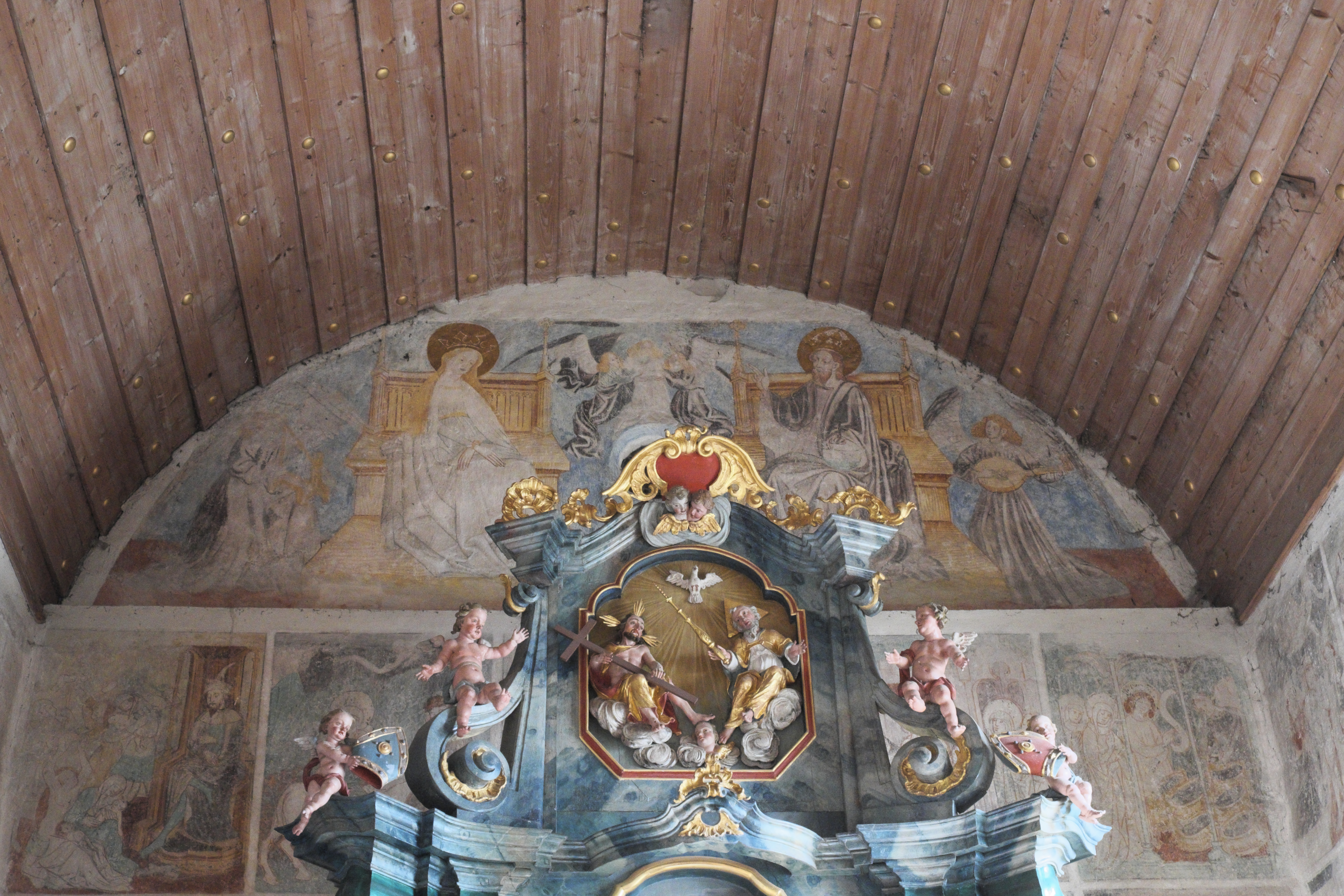 Friedhofskirche, ehemalige Pfarrkirche, St. Gallus in Mühlheim an der Donau im Landkreis Tuttlingen (Baden-Württemberg/Deutschland), Wandmalereien aus der Mitte oder zweiten Hälfte des 15. Jahrhunderts; Darstellungen an der Ostwand über dem Altar: Marienkrönung